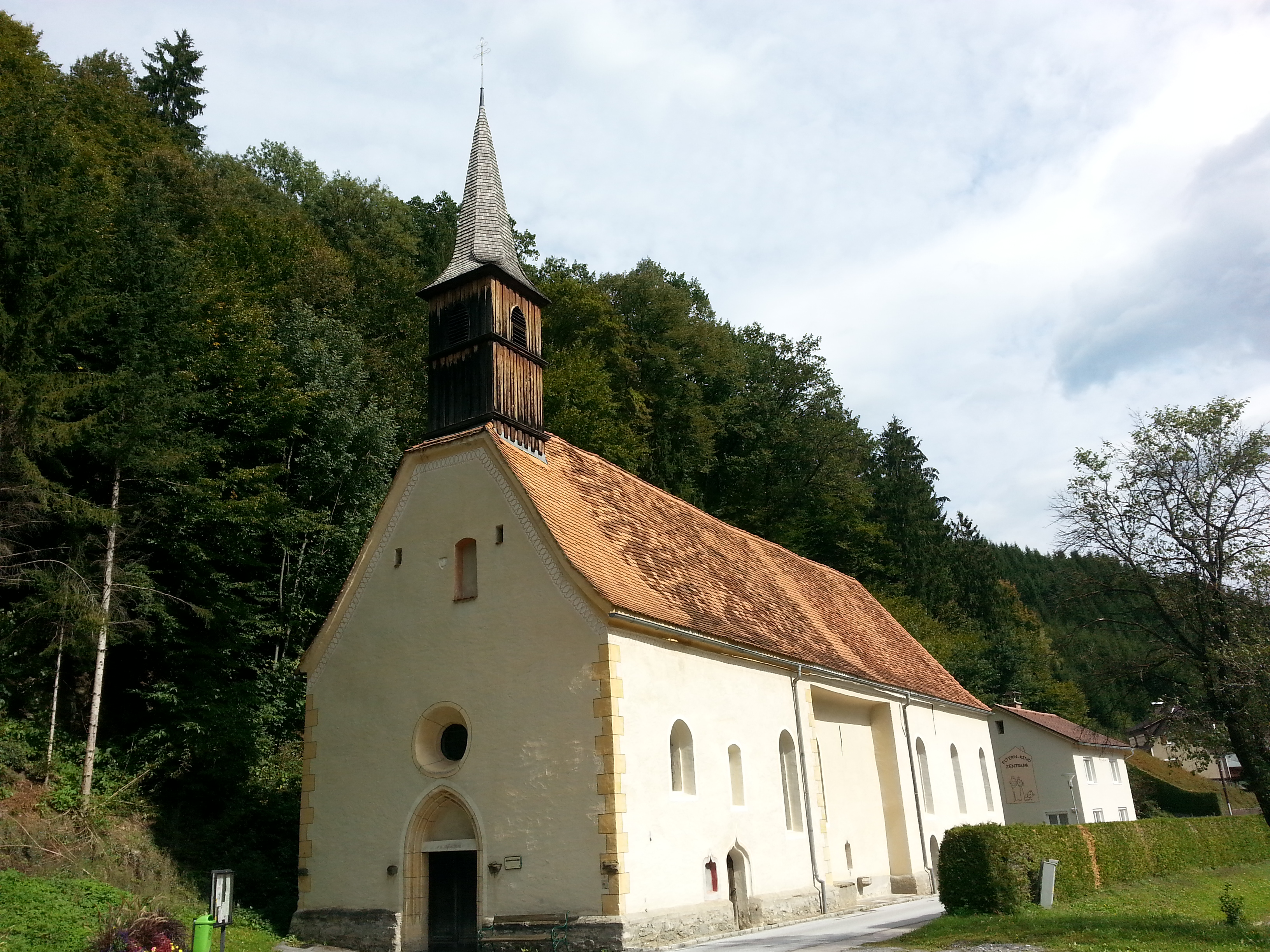 Kath. Filialkirche Hl. Blut